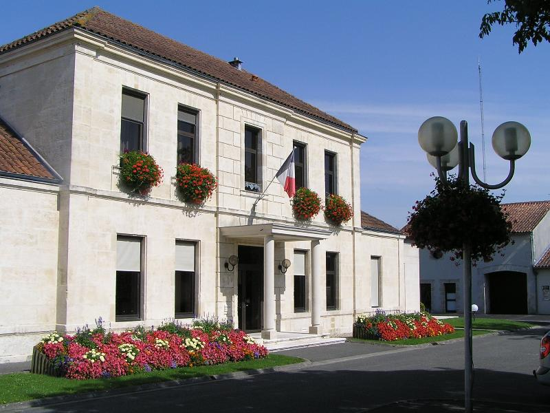 mairie de Châteaubernard en Charente